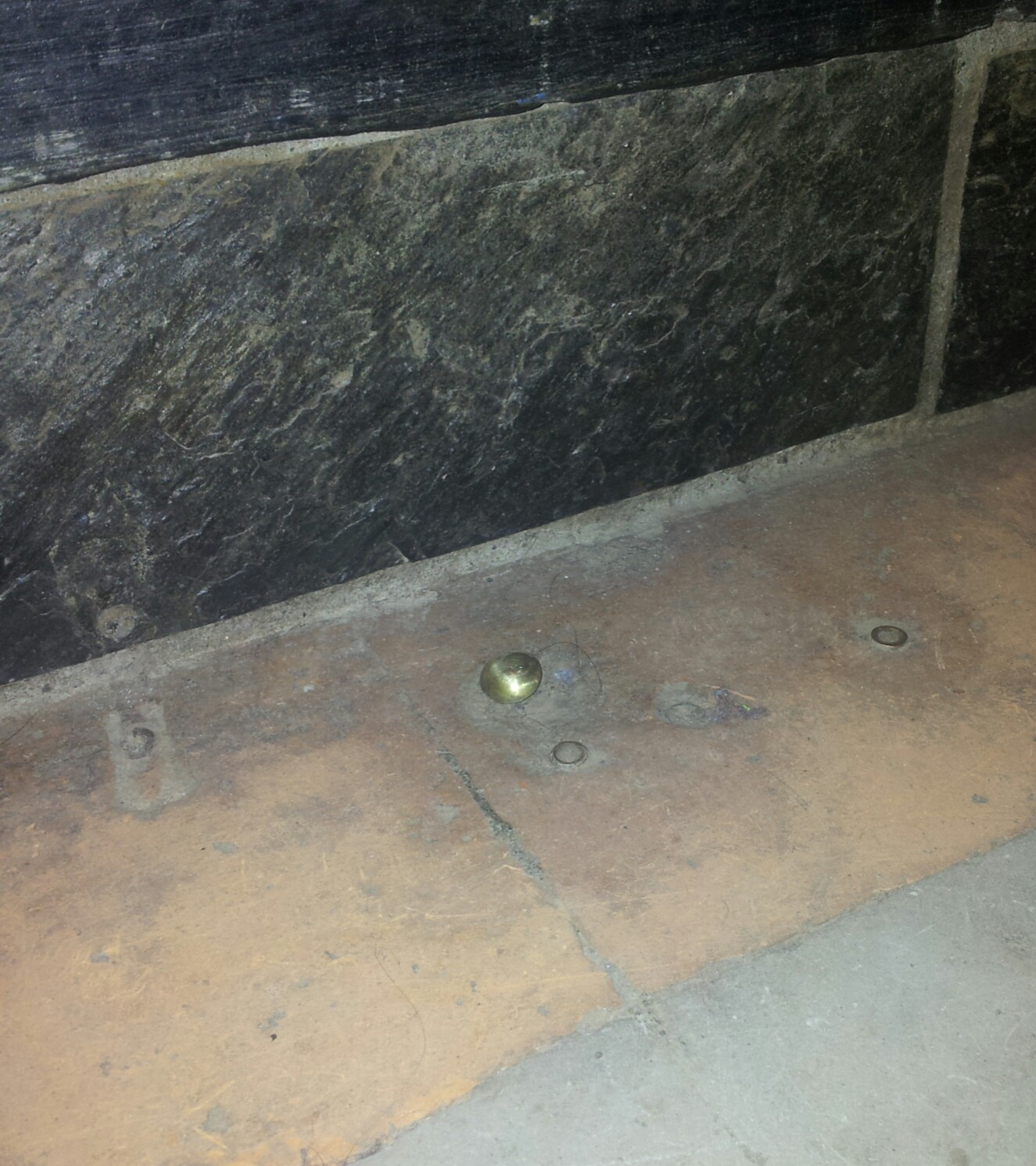 Koperen kees in academie gebouw Utrecht